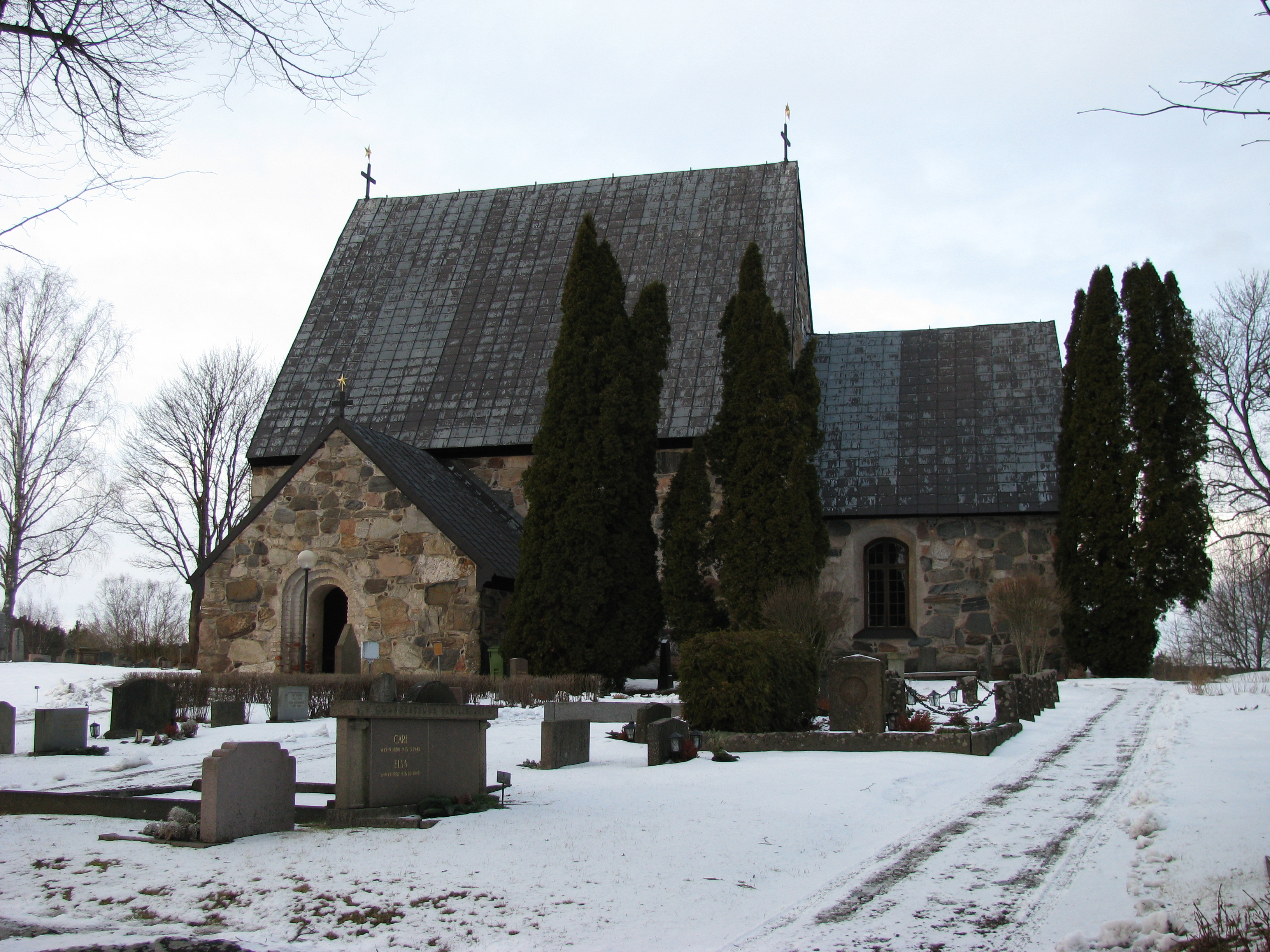 Össeby-Garns kyrka i Vallentuna kommun. Källa: eget foto, fotograf EnDumEn 11 februari 2009